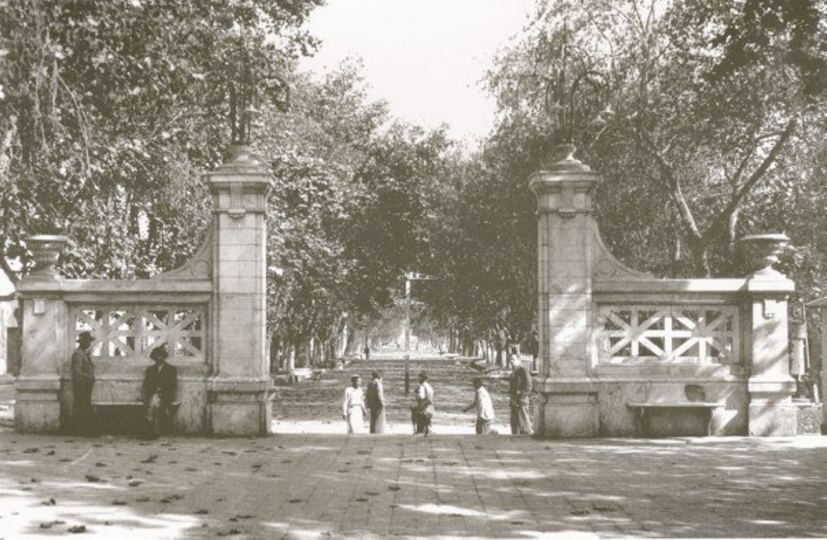 Avenida de Aguirre, 1935.